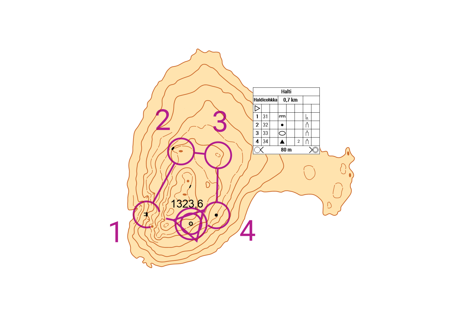 Soome kõrgeim orienteerumiskaart ja -rada. Start ja finiš on Soome kõrgeim punkt.